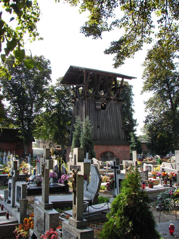 zabytkowa dzwonnica 07.1993.